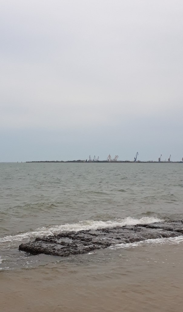 Вид на порт Камыш Бурун